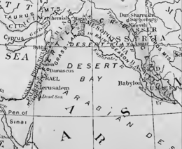 1916 წელს შექმნილი ნაყოფიერი ნახევარმთვარის რუქა ჯეიმს ჰენრი ბრესტედის მიერ, რომელმაც ამ ფრაზის პოპულარიზაცია მოახდინა